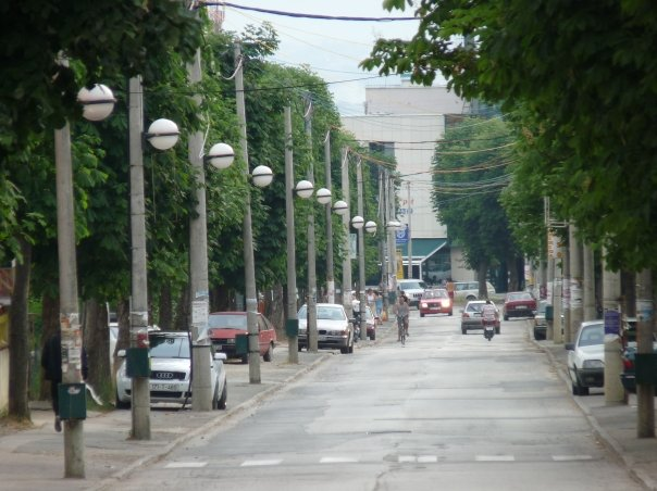 Ćaršija Kozarac, Glavni Trg Kozarca